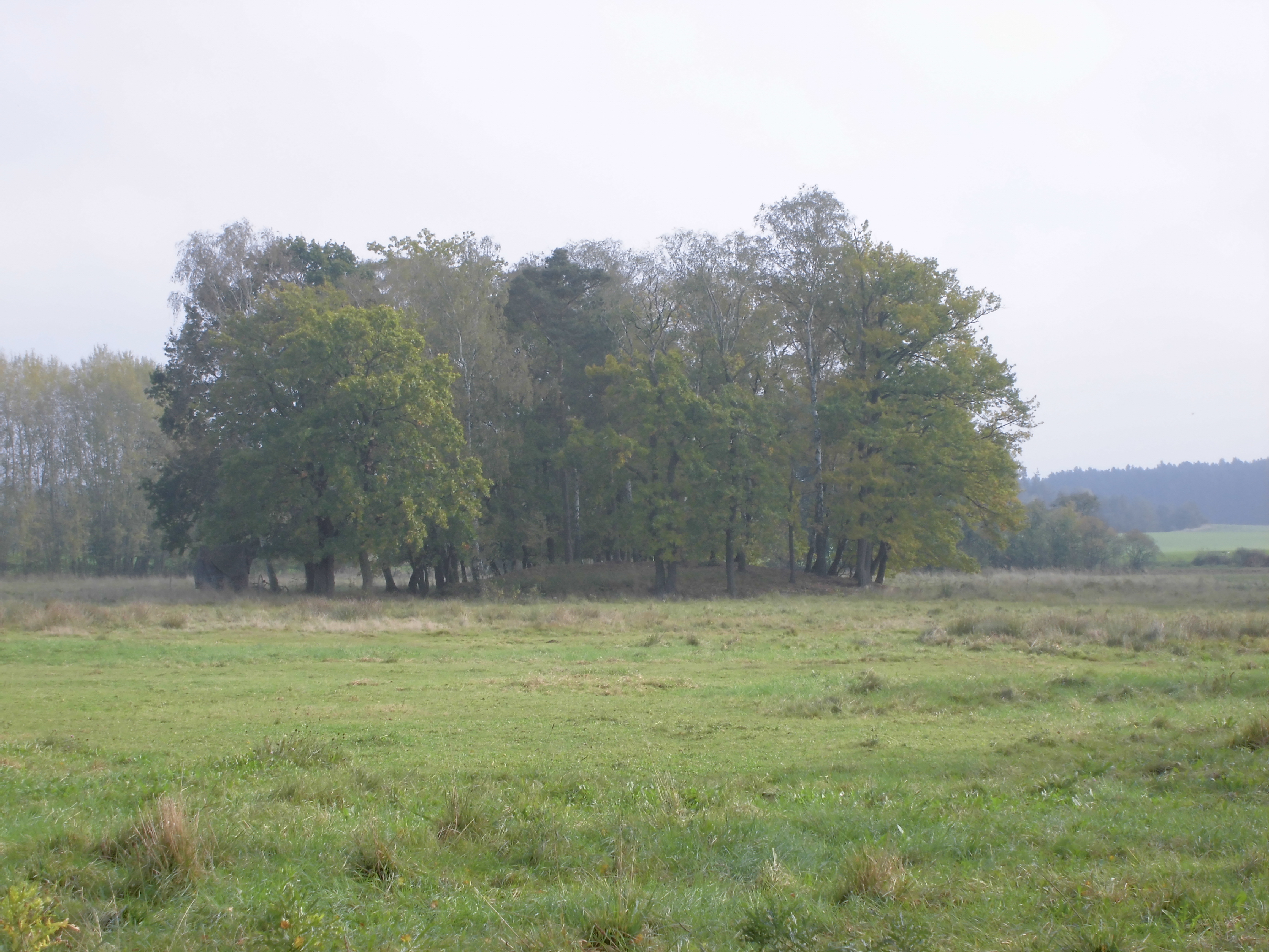 Turmhügel, deutsches Mittelalter, Bodendenkmal in Schöna-Kolpien